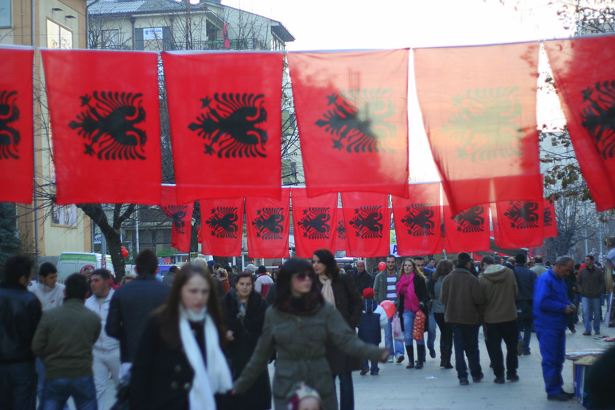 ...dhe t� gjith� si nj�!